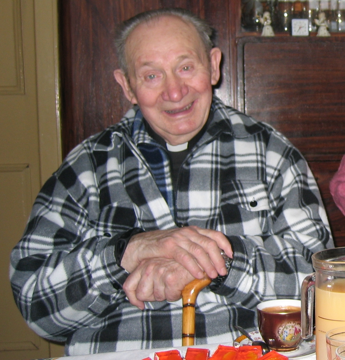 Mons. Josef Stejskal, 24.1.2009 při oslavě 87. narozenin v Horní Polici